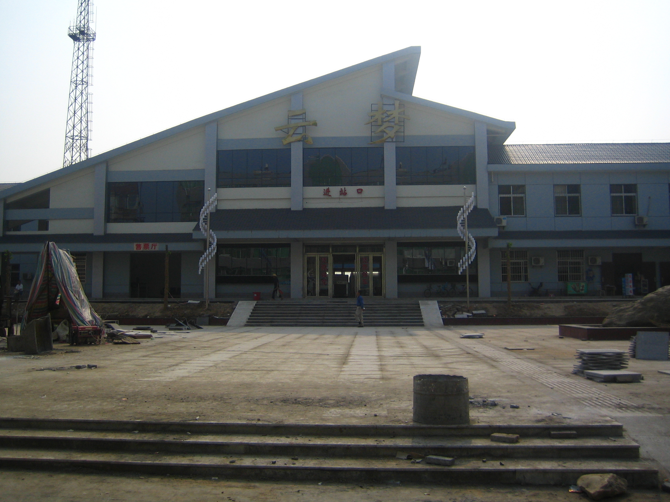 建设中的云梦火车站